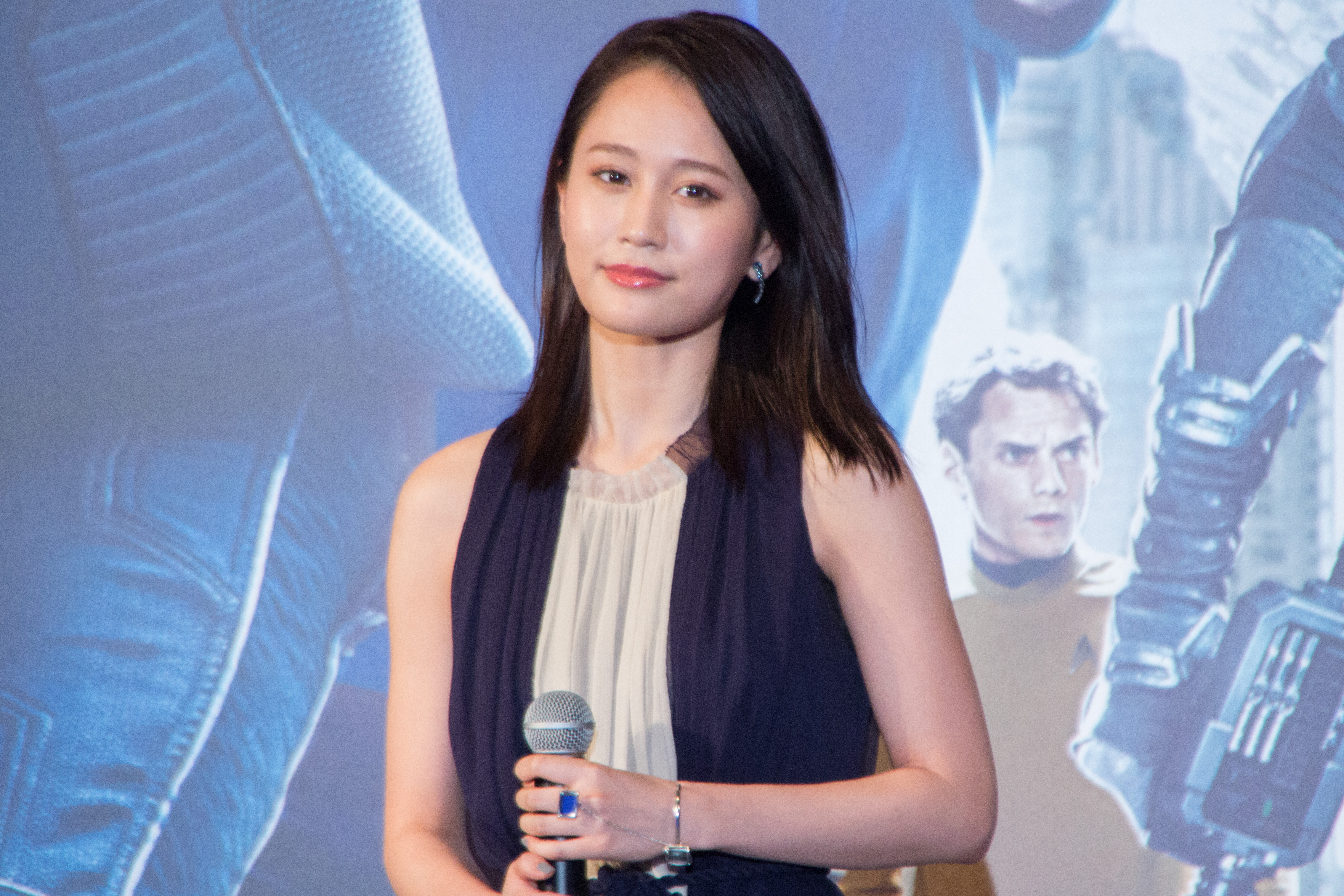 スター・トレック BEYOND ジャパン・プレミア レッドカーペット 前田敦子